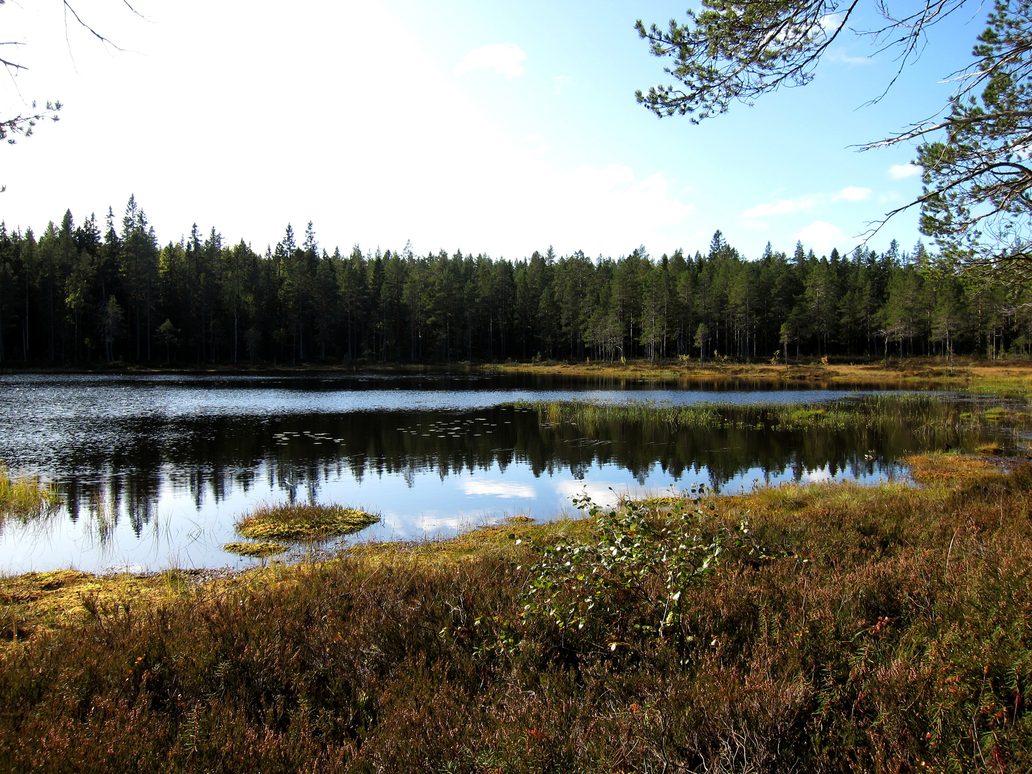 Aldertjärnen i Långbergskullarnas naturreservat